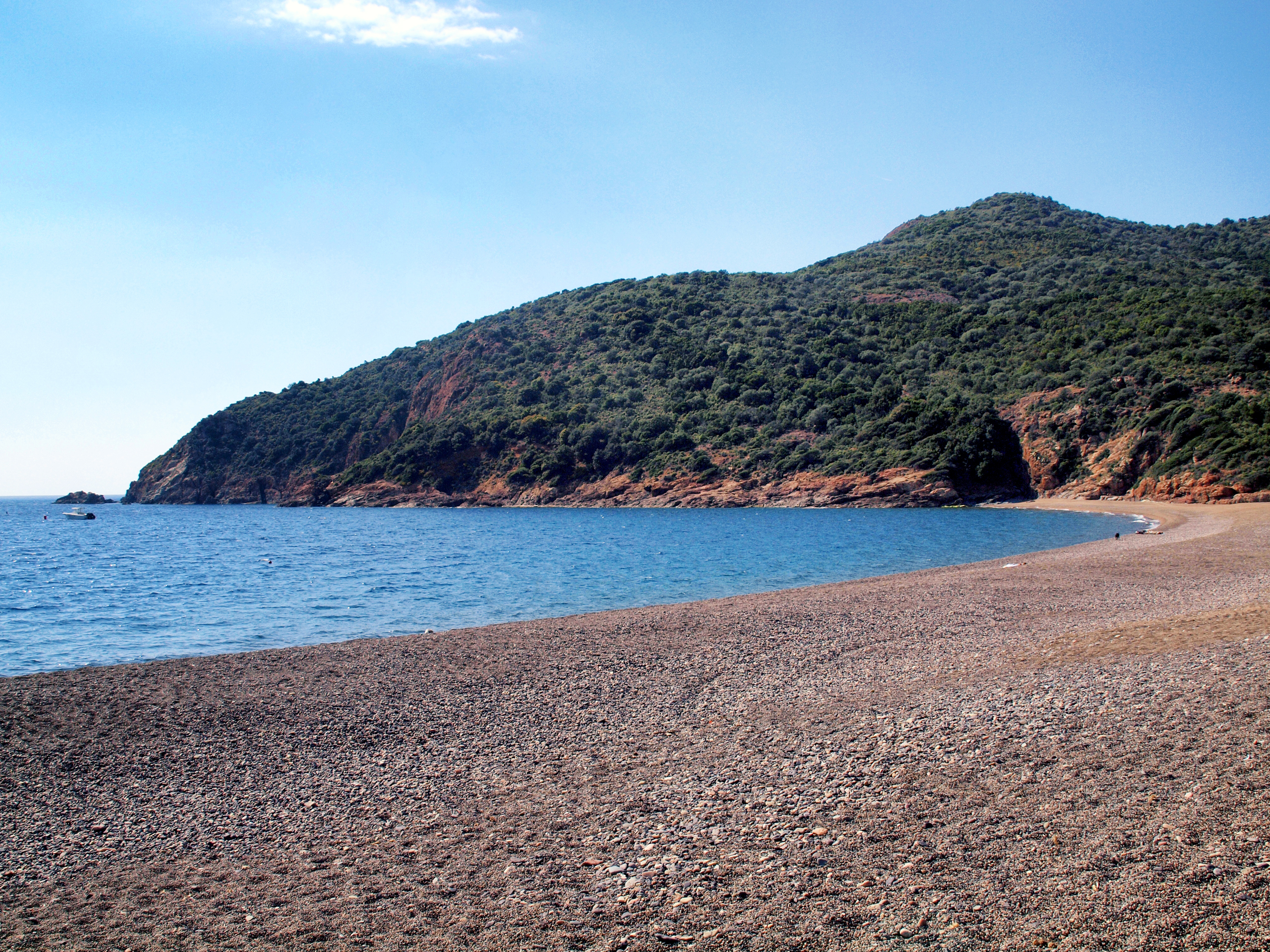 Serriera, Ouest Corse - Nord de la plage de Bussaglia, limite avec la commune de Partinello